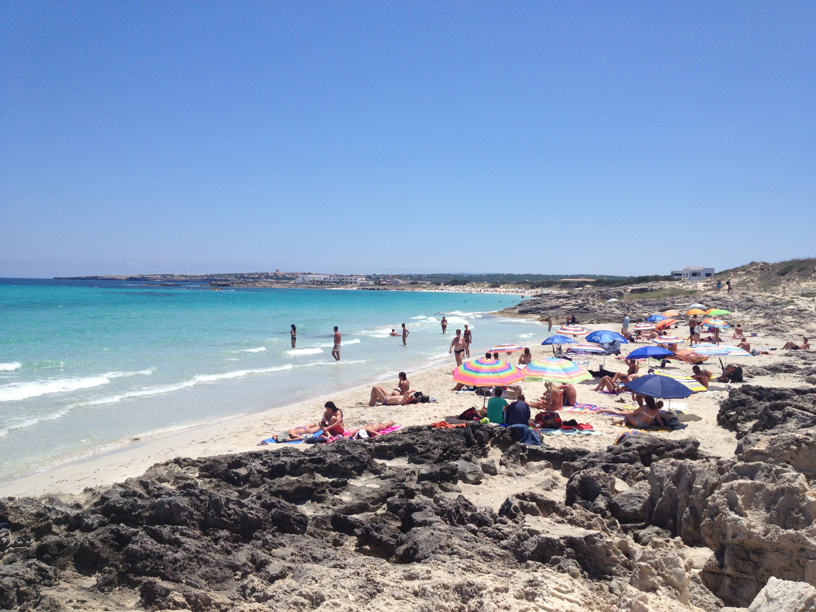 Es Pujols - Formentera